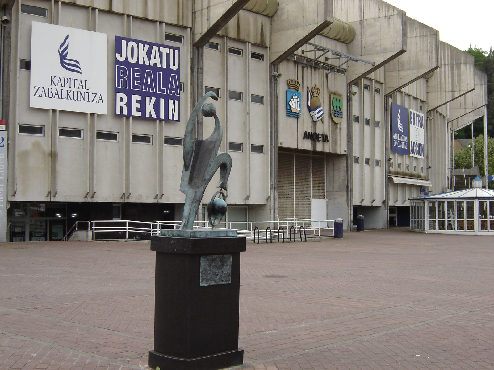 Anoeta estadioa